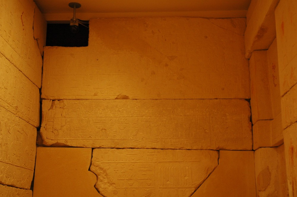 Die Kultkammer des Ka-ni-nisut im Kunsthistorischen Museum Wien von der Mastaba des Ka-ni-nisut aus Giza, Grabung Hermann Junker 1913. Südwand mit Opferliste und Fragmenten der Speisetischszene. Inv.Nr. 8006